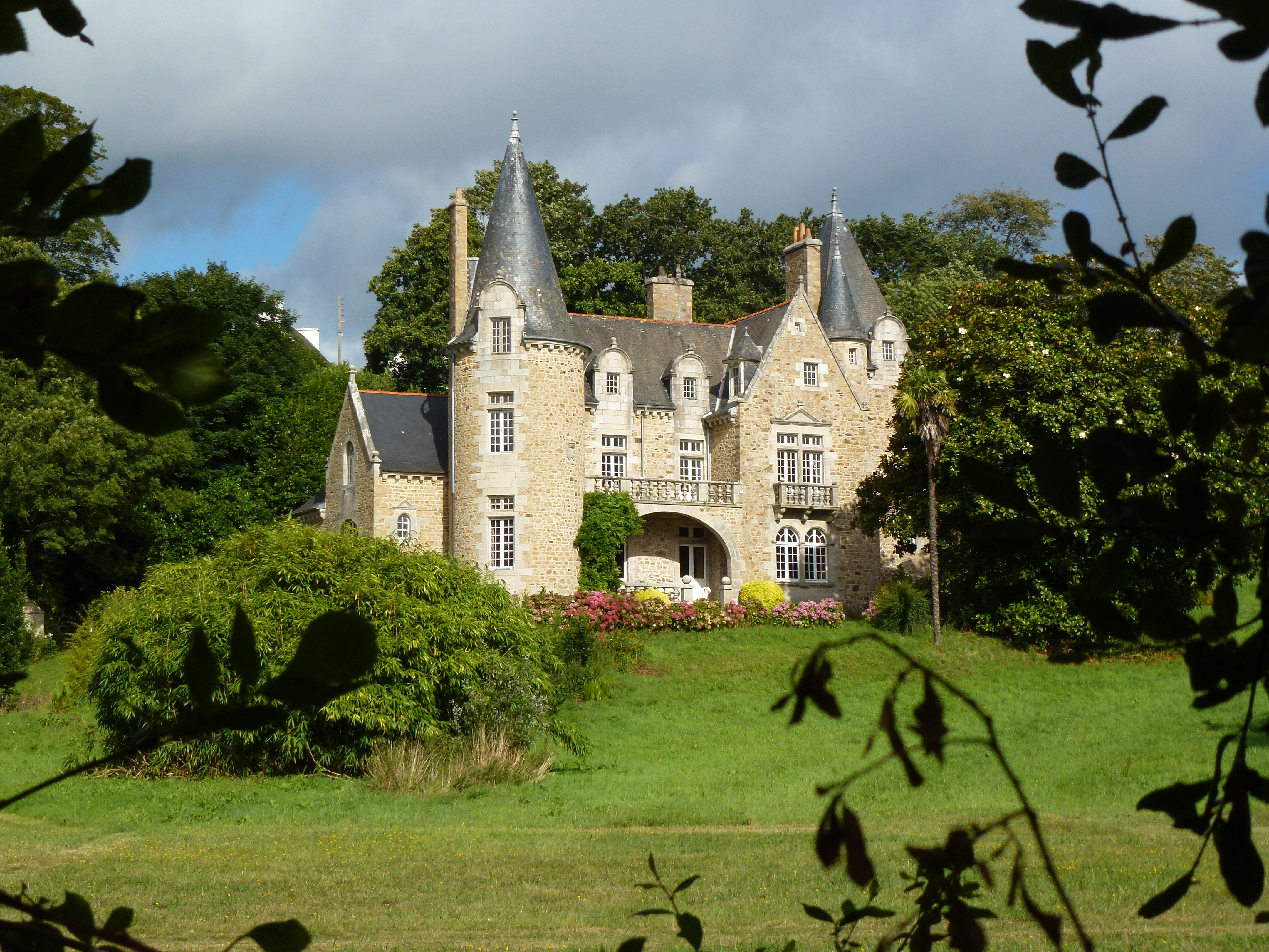 vue depuis la plage du Clouet